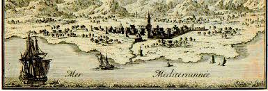 Grabado sobre Cambrils en el siglo XVII efectuado por Beaulieu